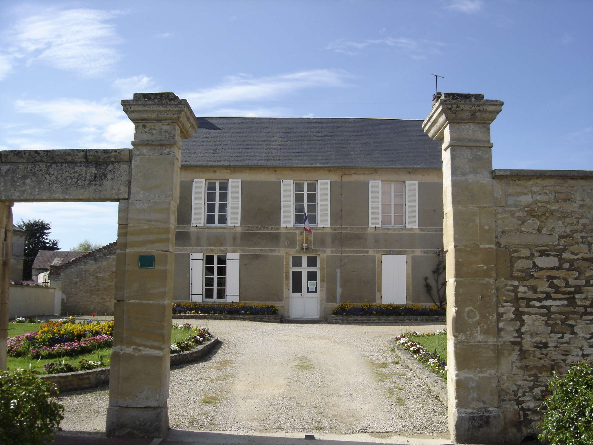 la mairie de Basly vue de la Place de l'Eglise